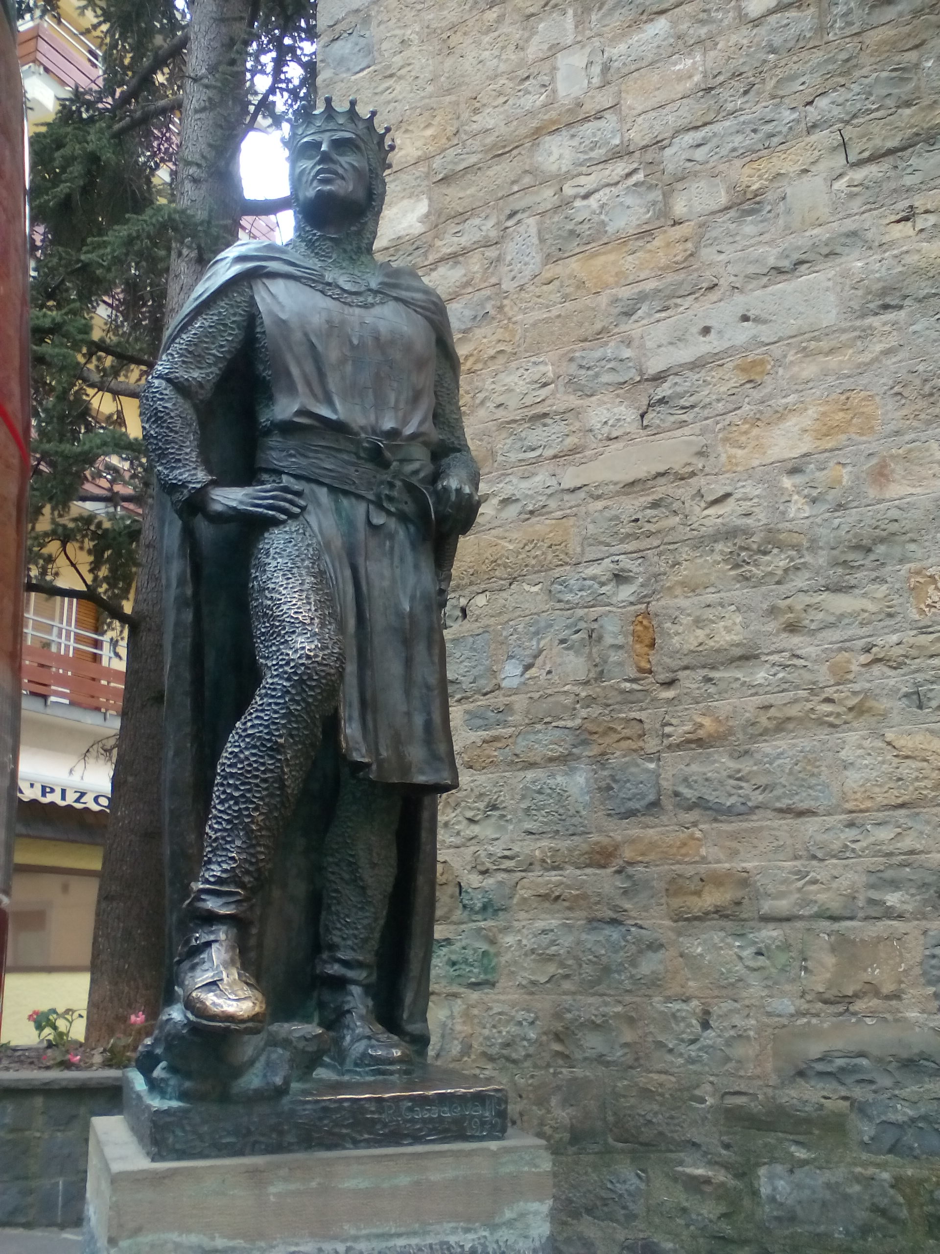 Estatua de Ramón Casadevall y realizada en 1972.